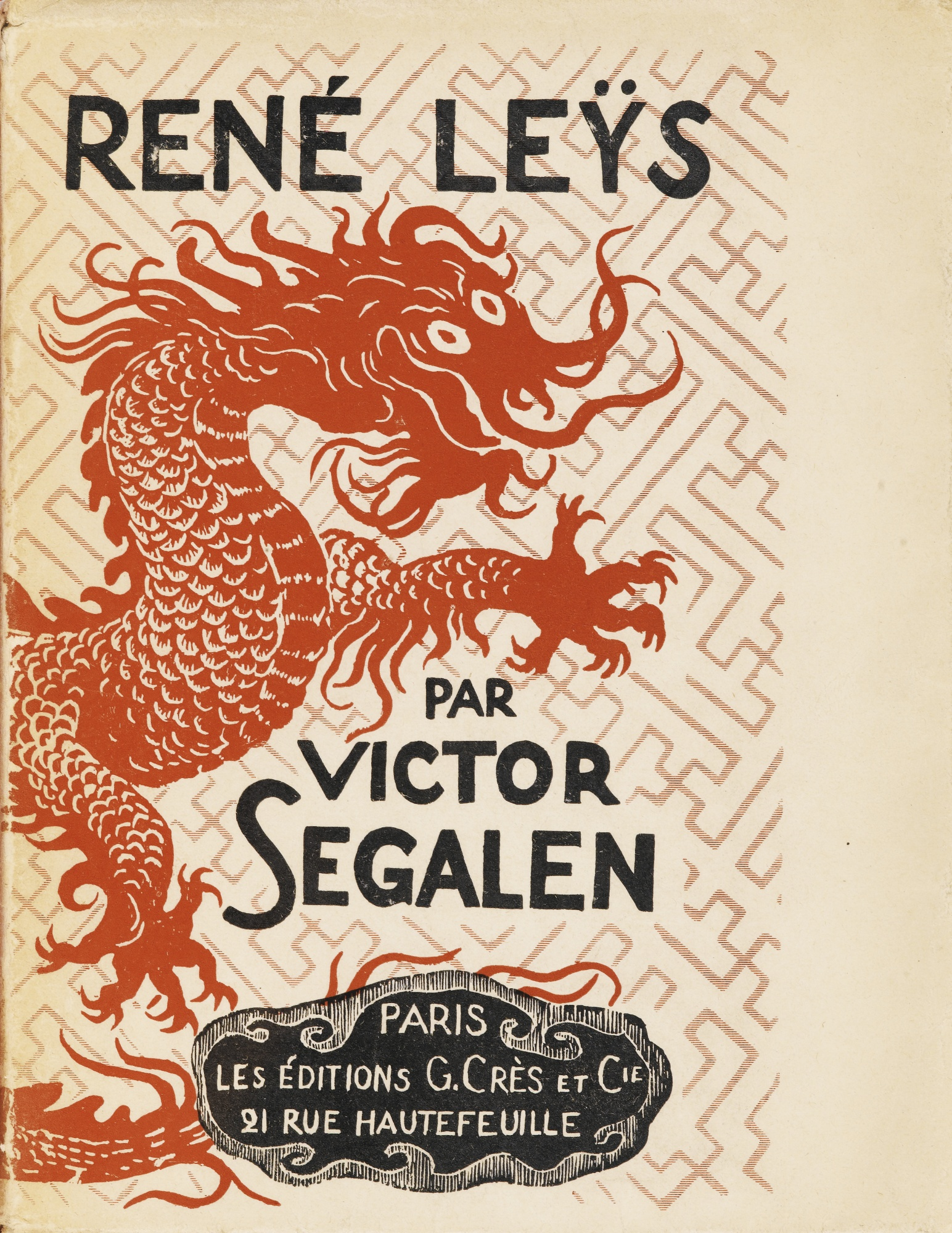 Victor Segalen, René Leys, Paris, Georges Crès et Cie, 1922Couverture illustrée par Georges-Daniel de Monfreid.